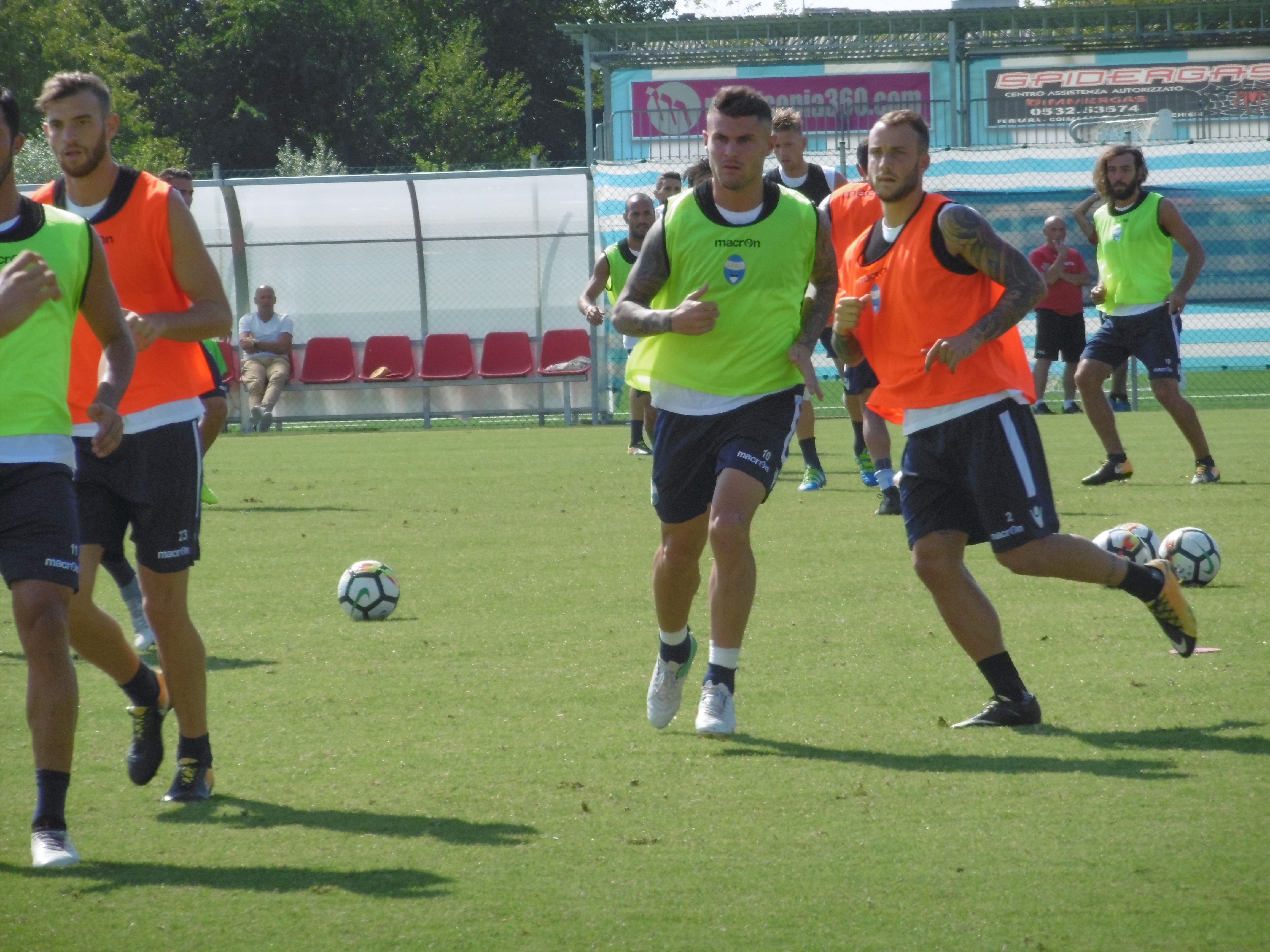 Federico Viviani giocatore della spa